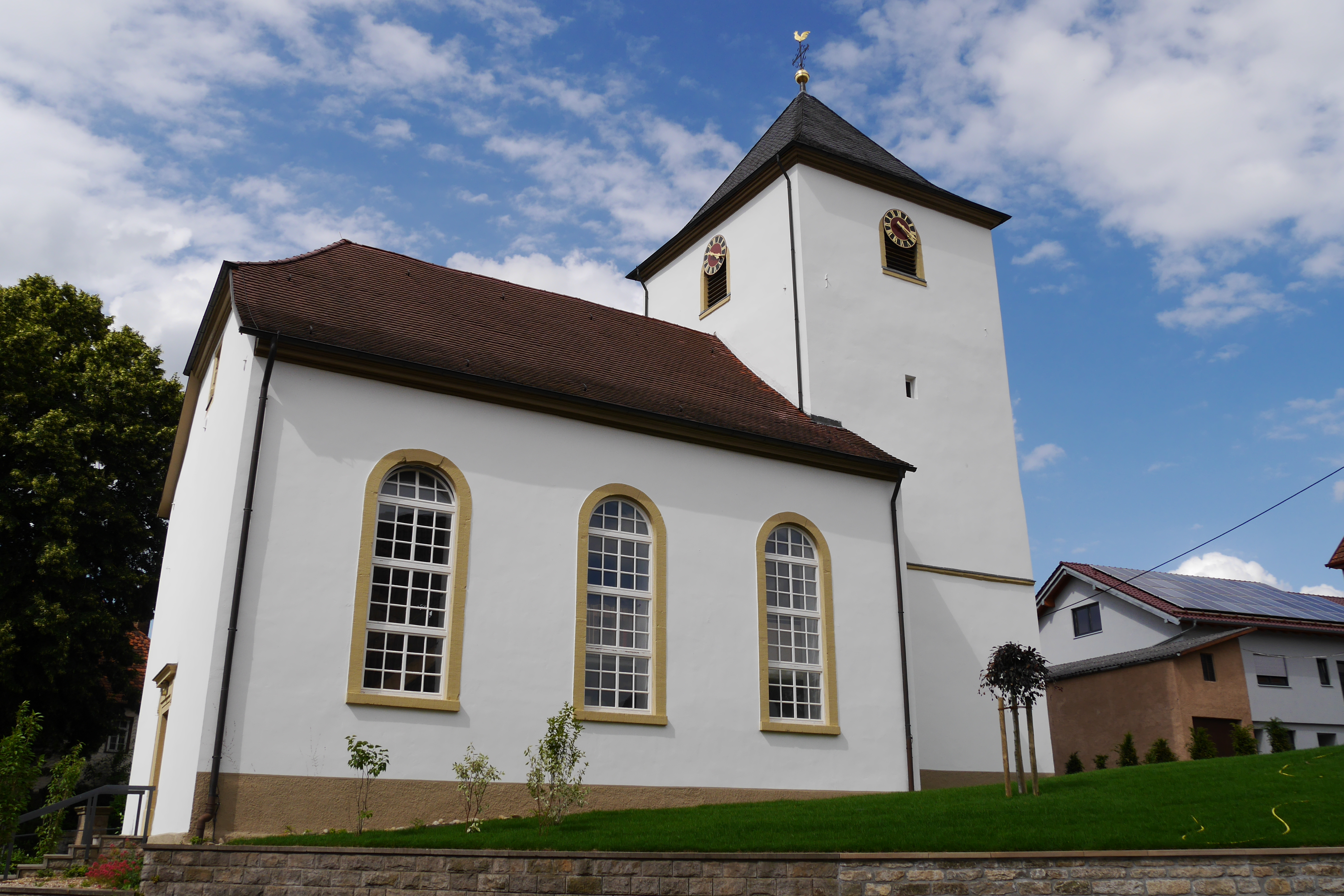 Der 2016 neu gestaltete Platz vor der Kirche lädt zum verweilen ein.